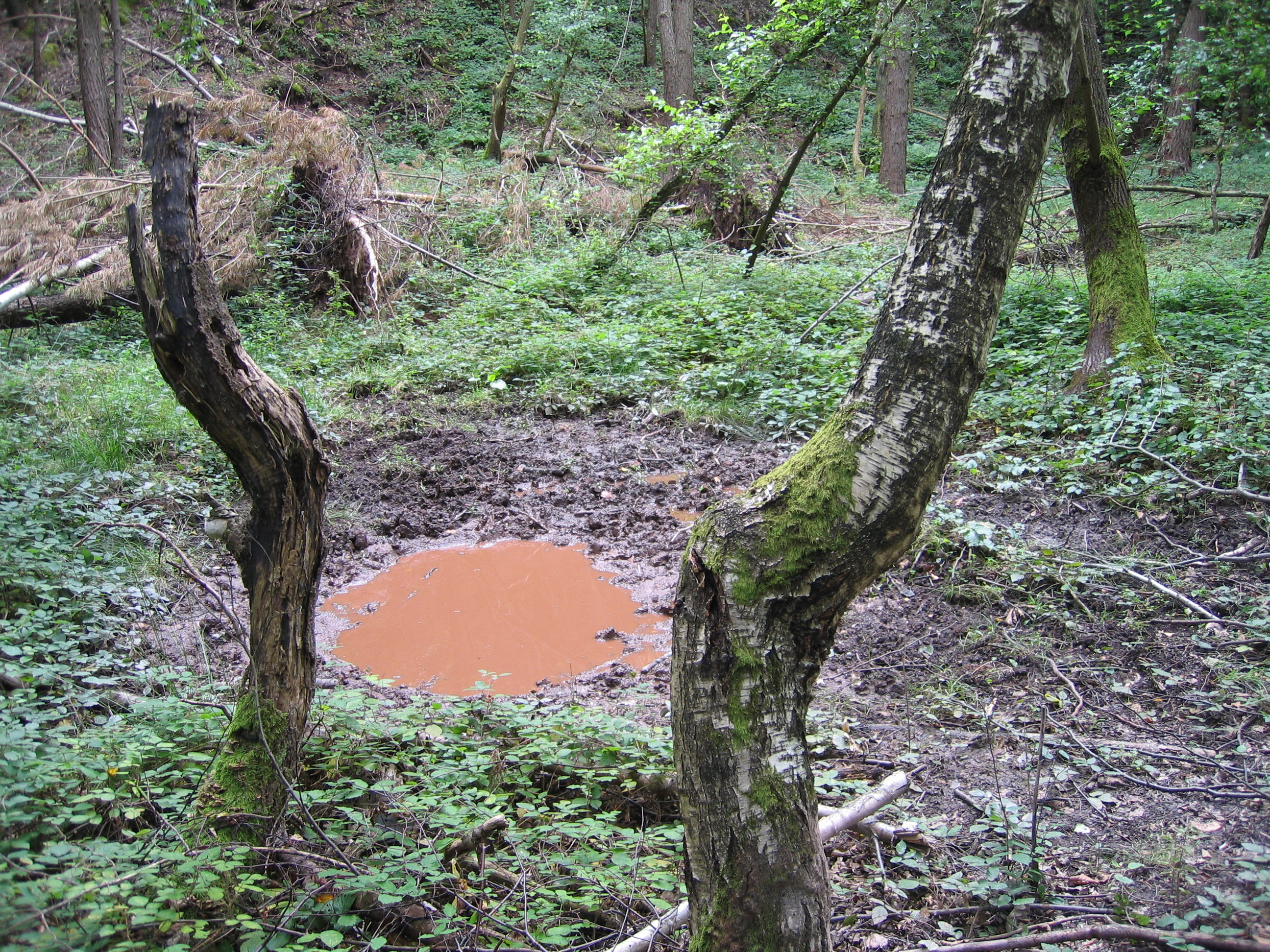 Schorlenberg, Wildschweinsuhle, Steinbruch Vorderes Köpfchen